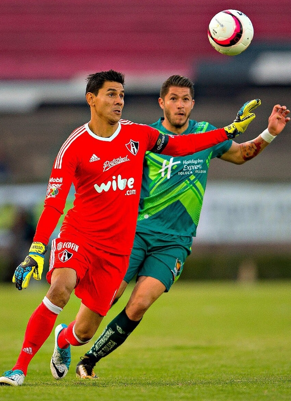 O. Ustari Atlas